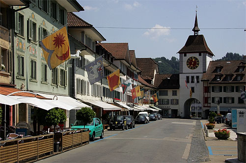 Hauptgasse von Willisau mit Untertor